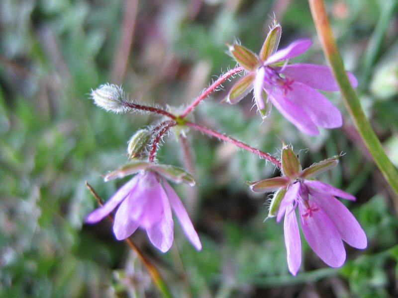 Gewöhnlicher oder Schierlingsblättriger Reiherschnabel Erodium cicutarium